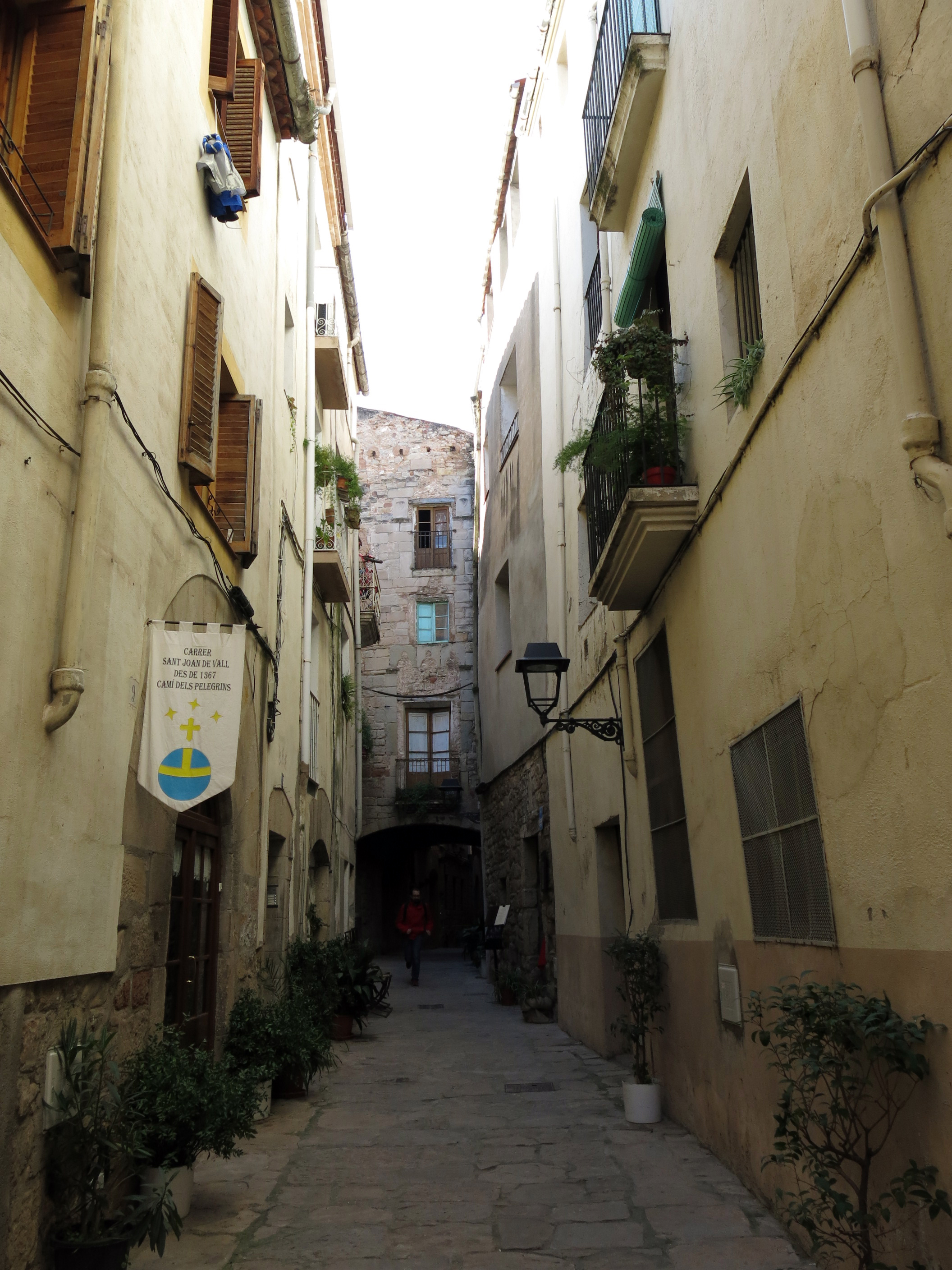 Carrer de Sant Joan (Monistrol de Montserrat))